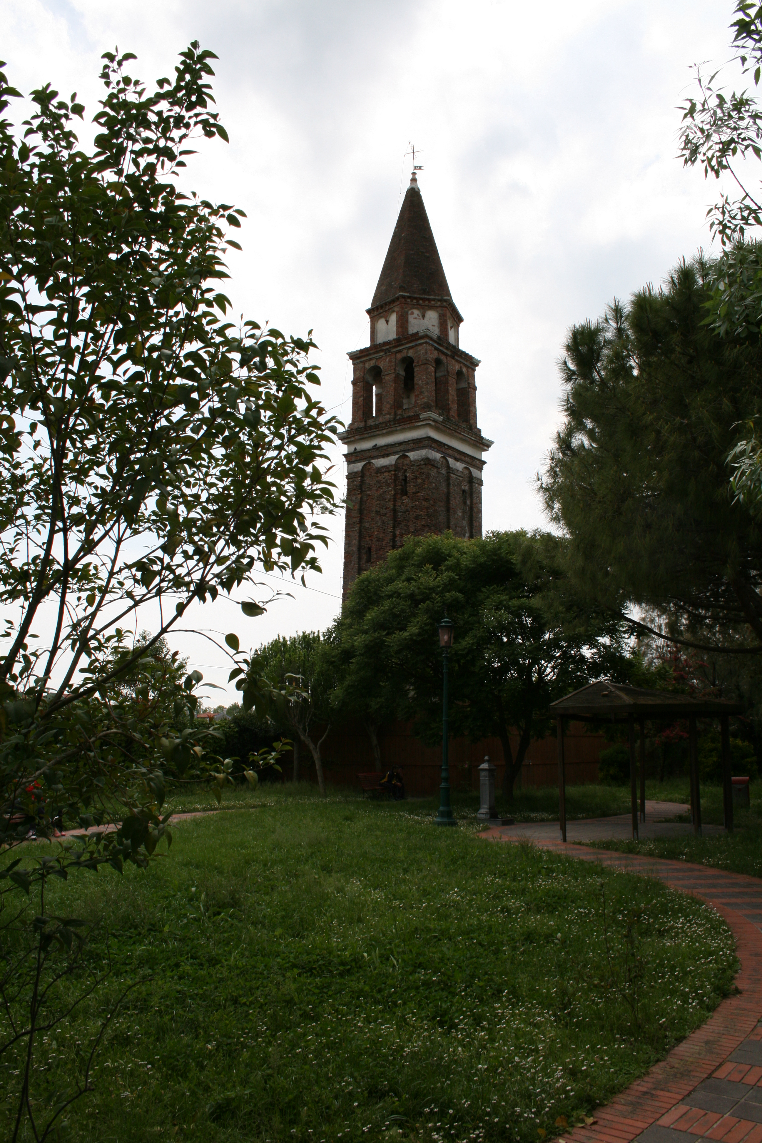 Mazzorbo public park